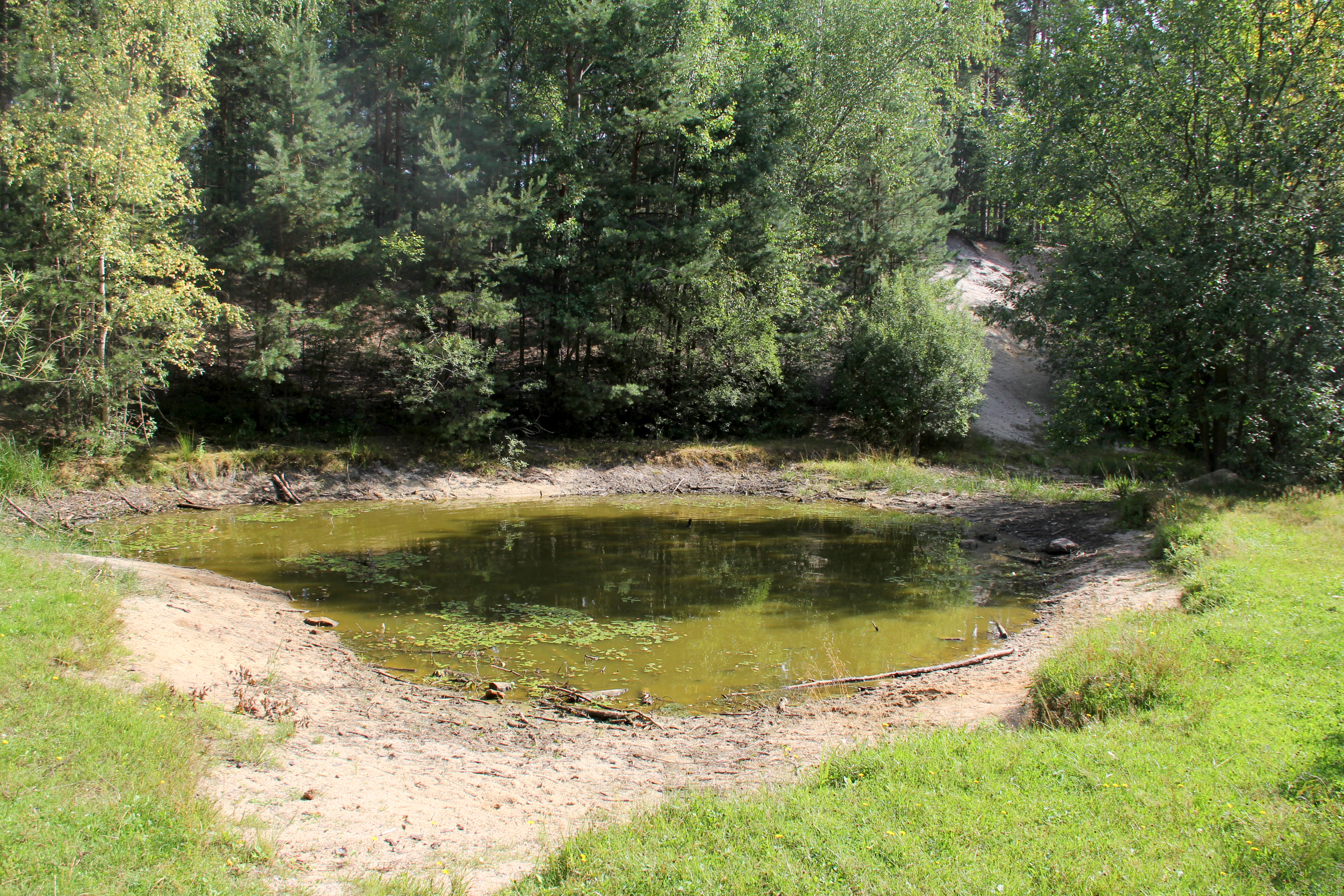 Sandgrube